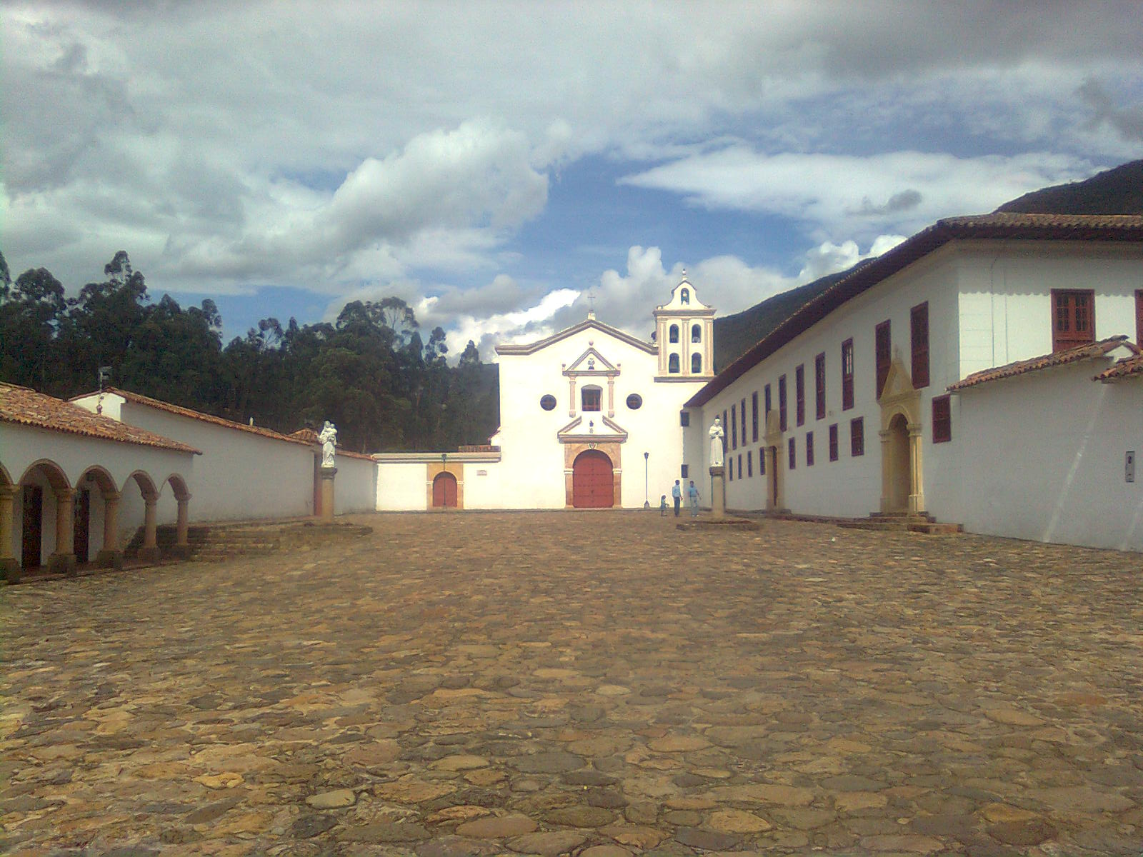 Monasterio de la Candelaria (Raquira,Colombia)